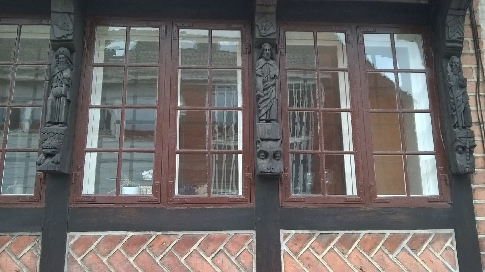 Apostle på Apostelhuset i Riddergade, Næstved.